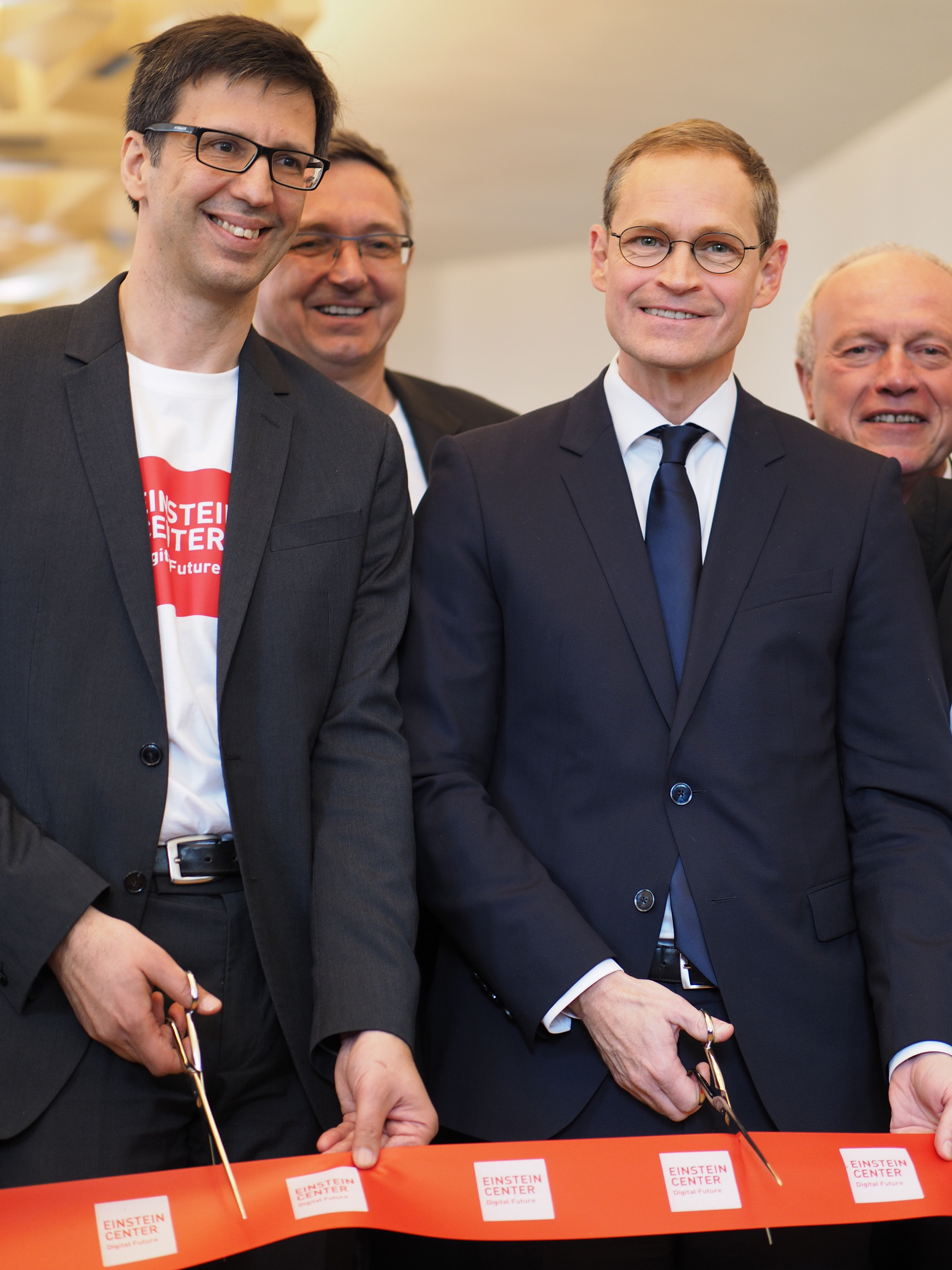 Der Vorsitzende des Einstein Center Digital Future, Odej Kao (links), und der Regierende Bürgermeister von Berlin, Michael Müller (rechts), bei der Einweihung des Zentrums